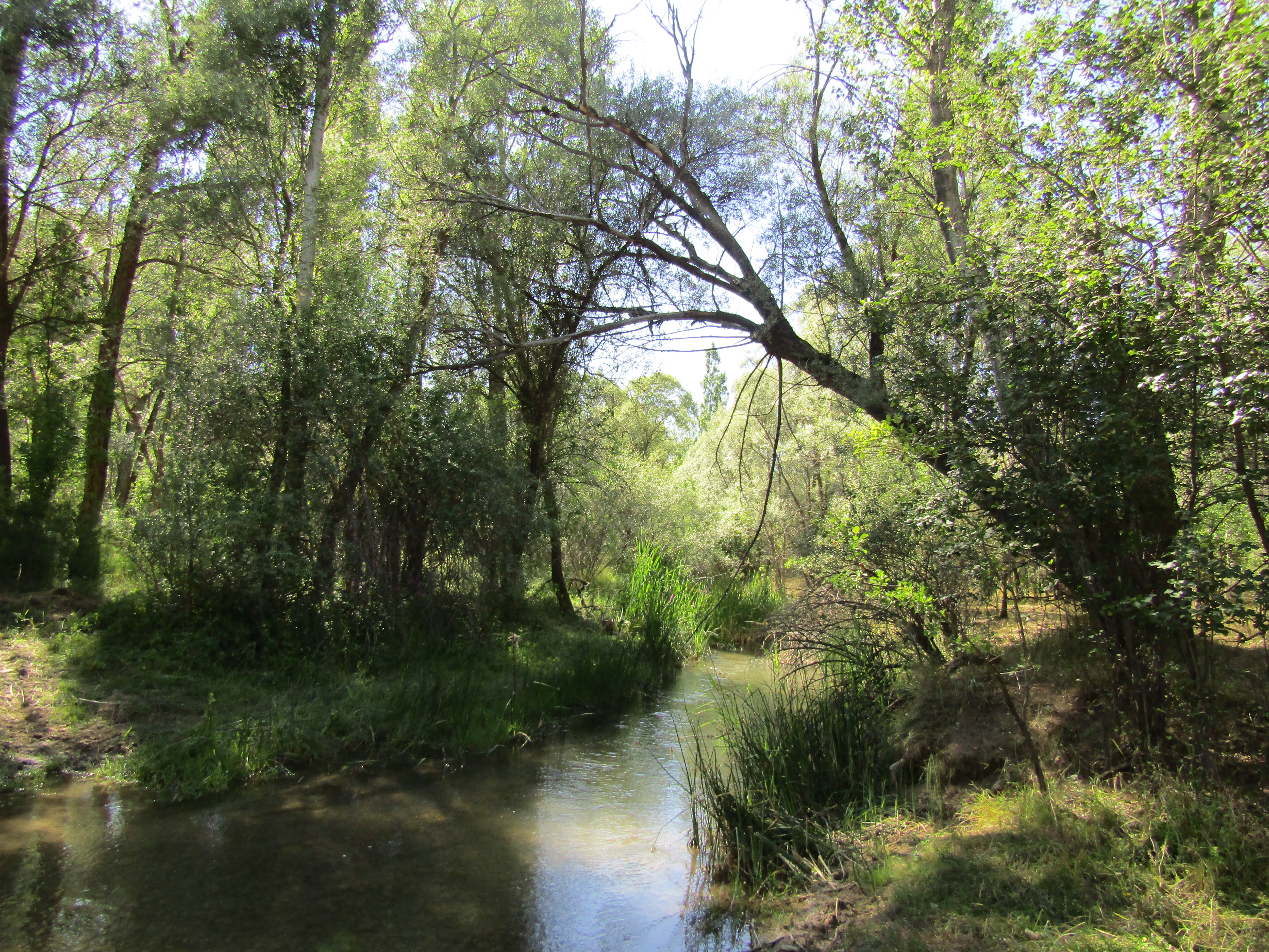 Kaldırak Özü